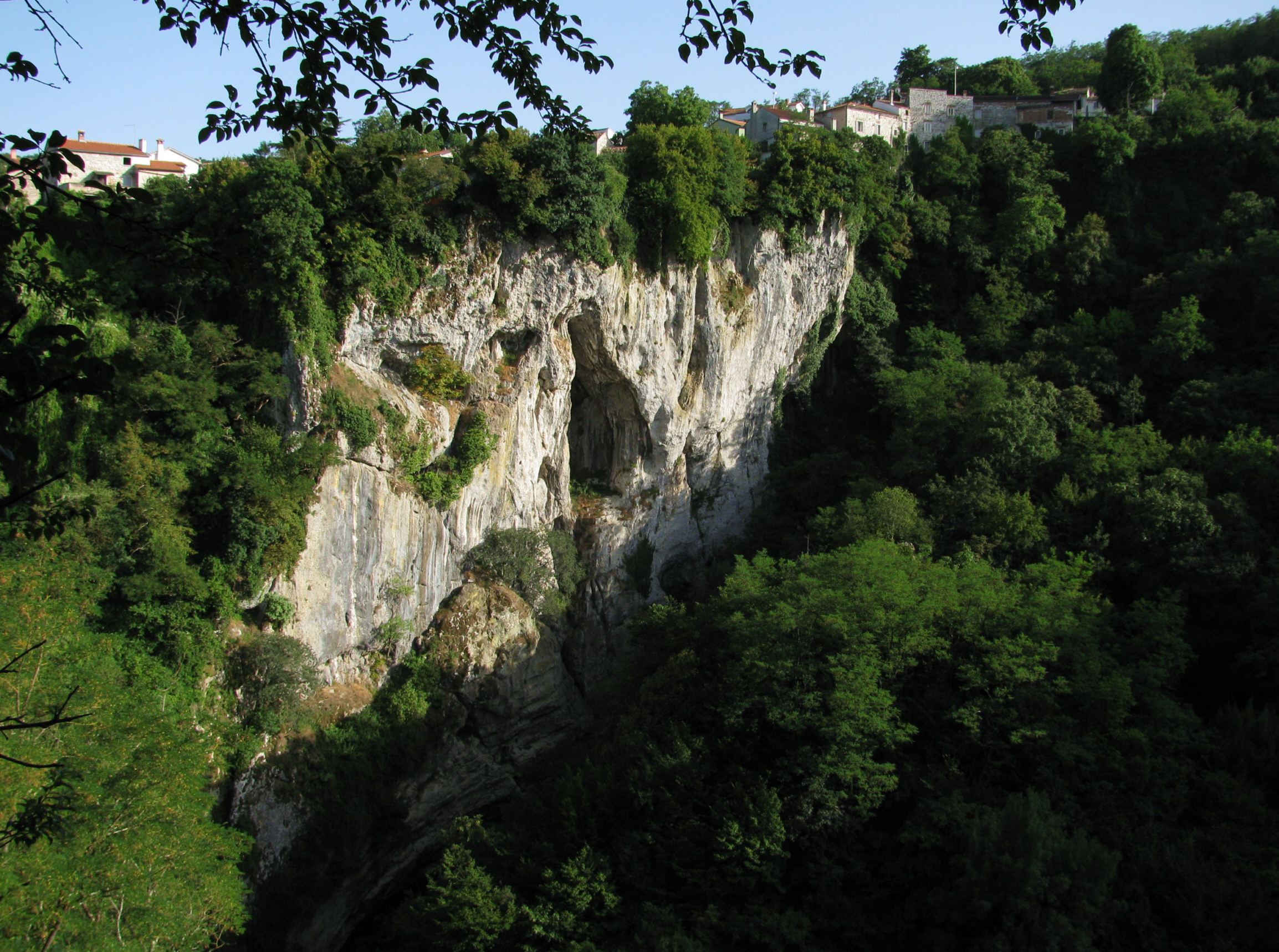 Fojba-Schlucht in Pazin, Kroatien